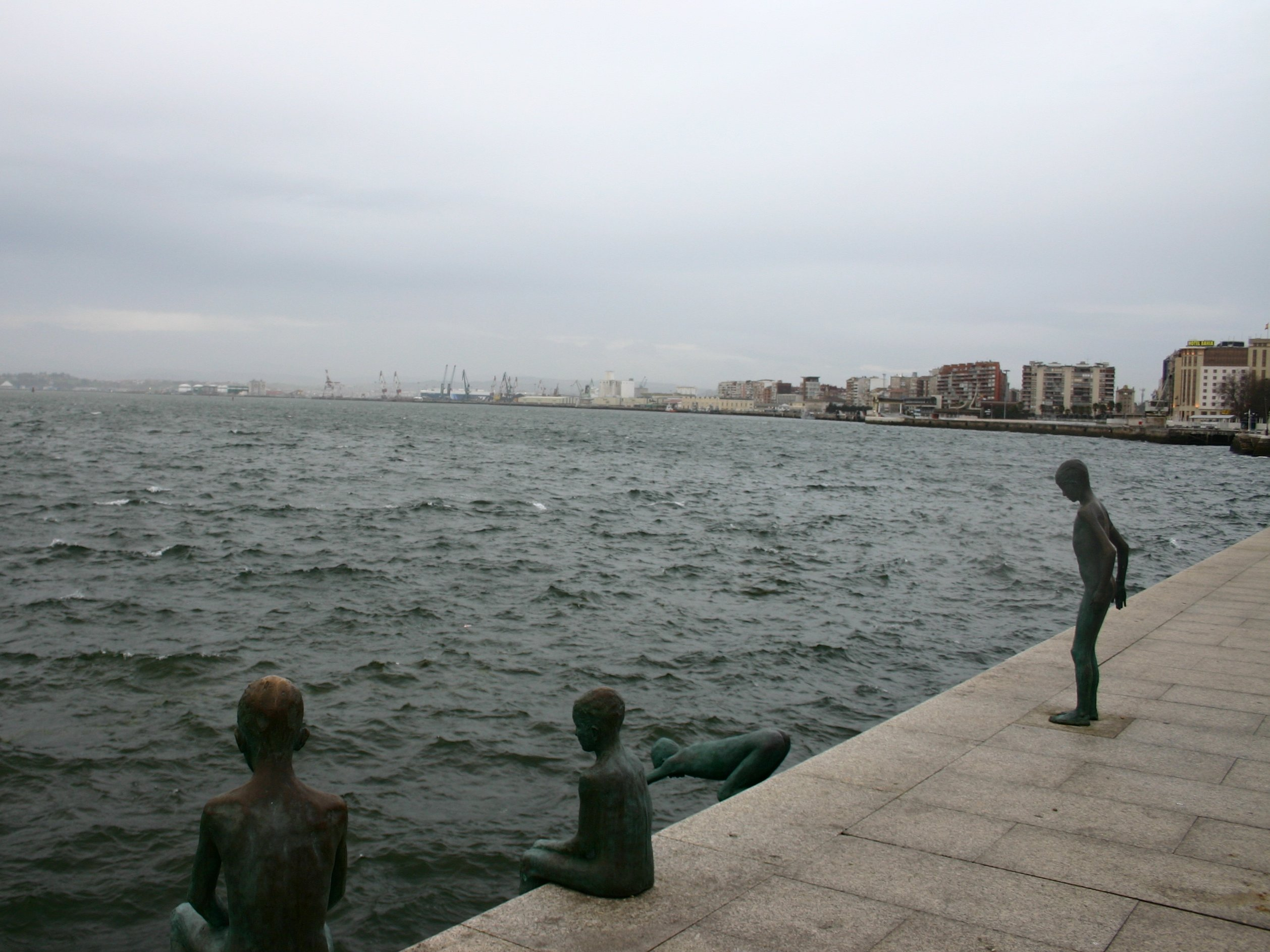 Los raqueros.